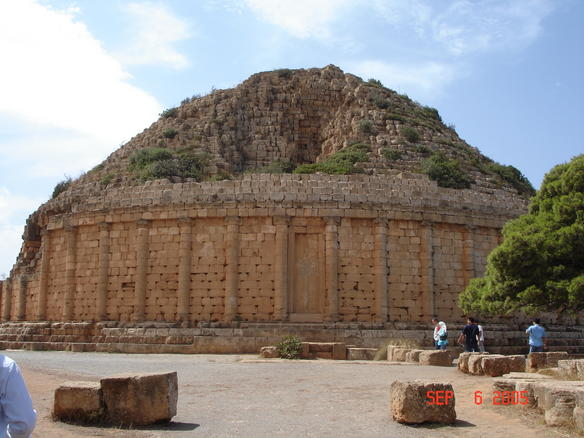 Tombeau de la Crietiene, Tipaza, Algérie (Cf [1])